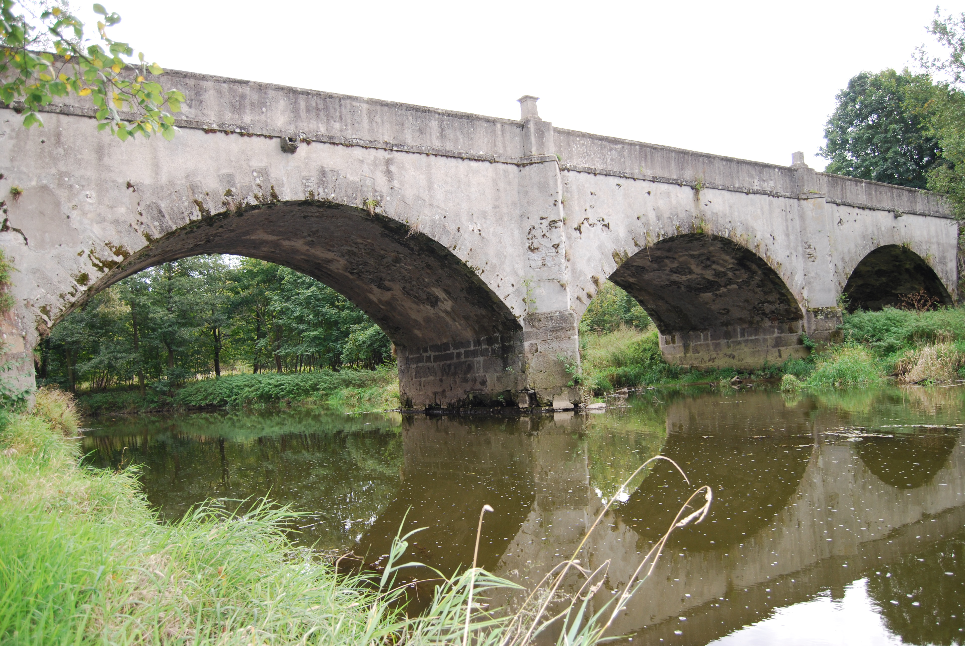 Silniční most přes řeku Skalici. Dolní Nerestce je část obce Nerestce v okrese Písek. Česká republika.